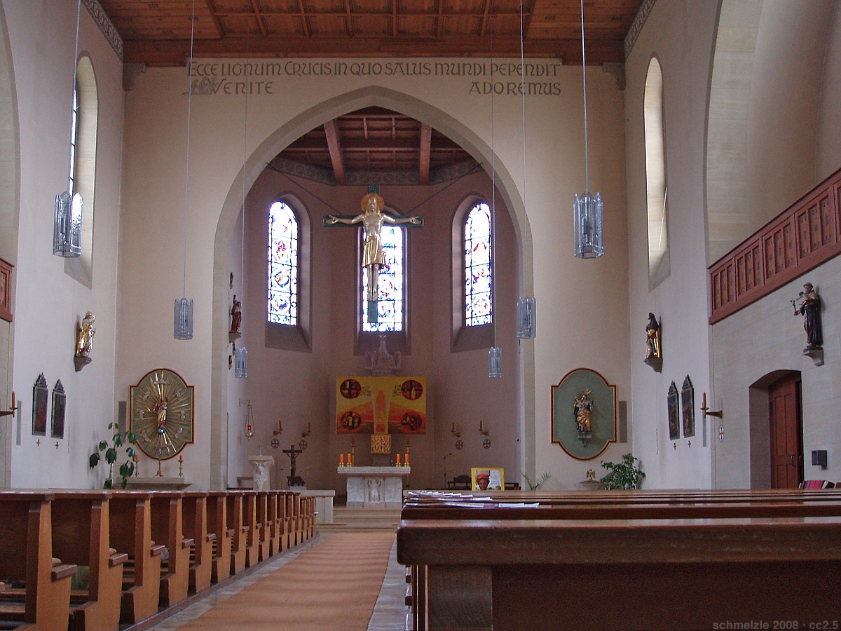 Blick zum Chor der Pfarrkirche Heilig Kreuz in Stein am Kocher (Ortsteil von Neuenstadt am Kocher)